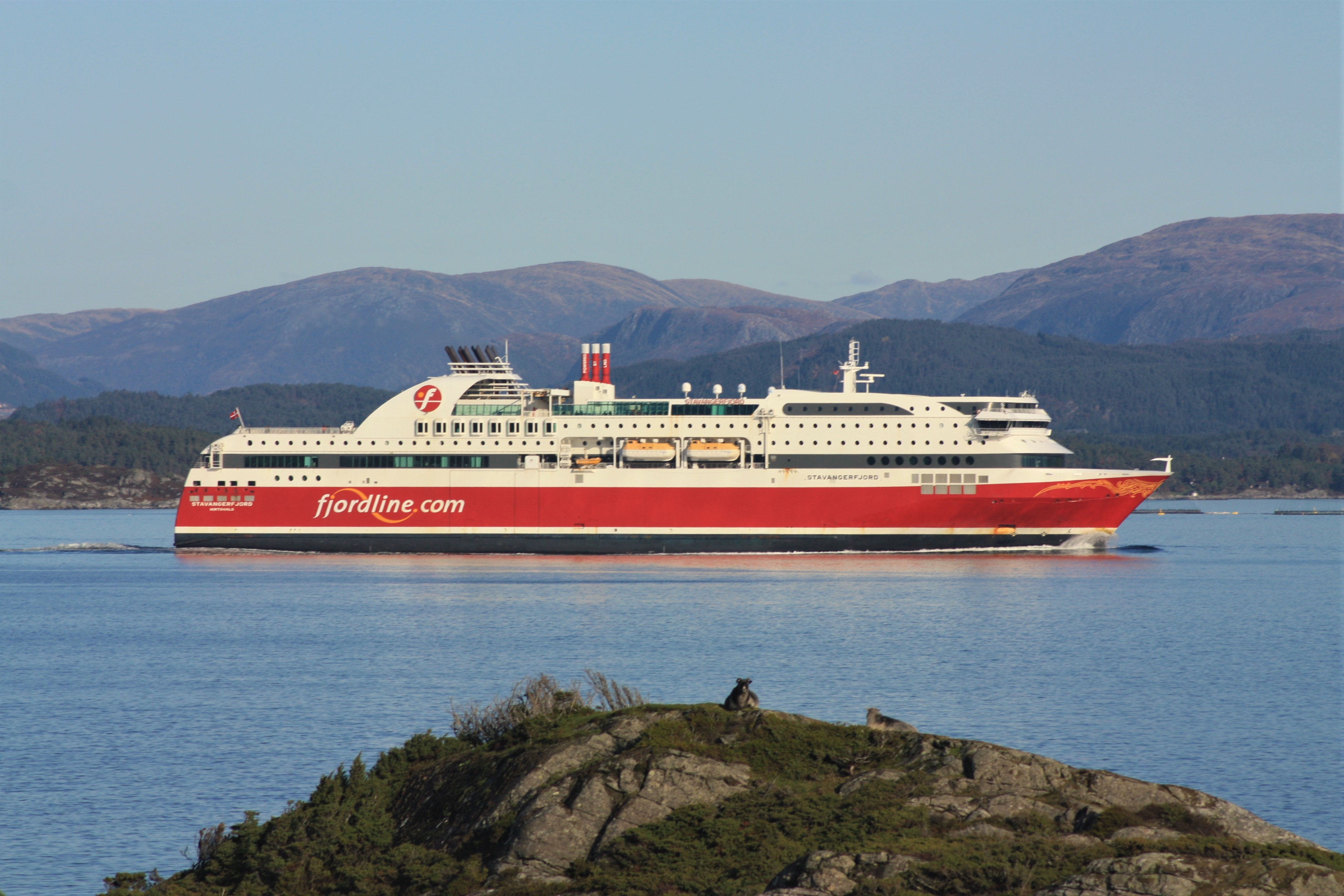 «Stavangerfjord» i Korsfjorden